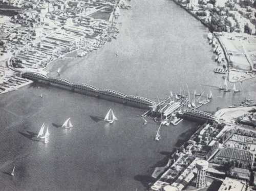 Imbaba Bridge, Cairo, Egypt.